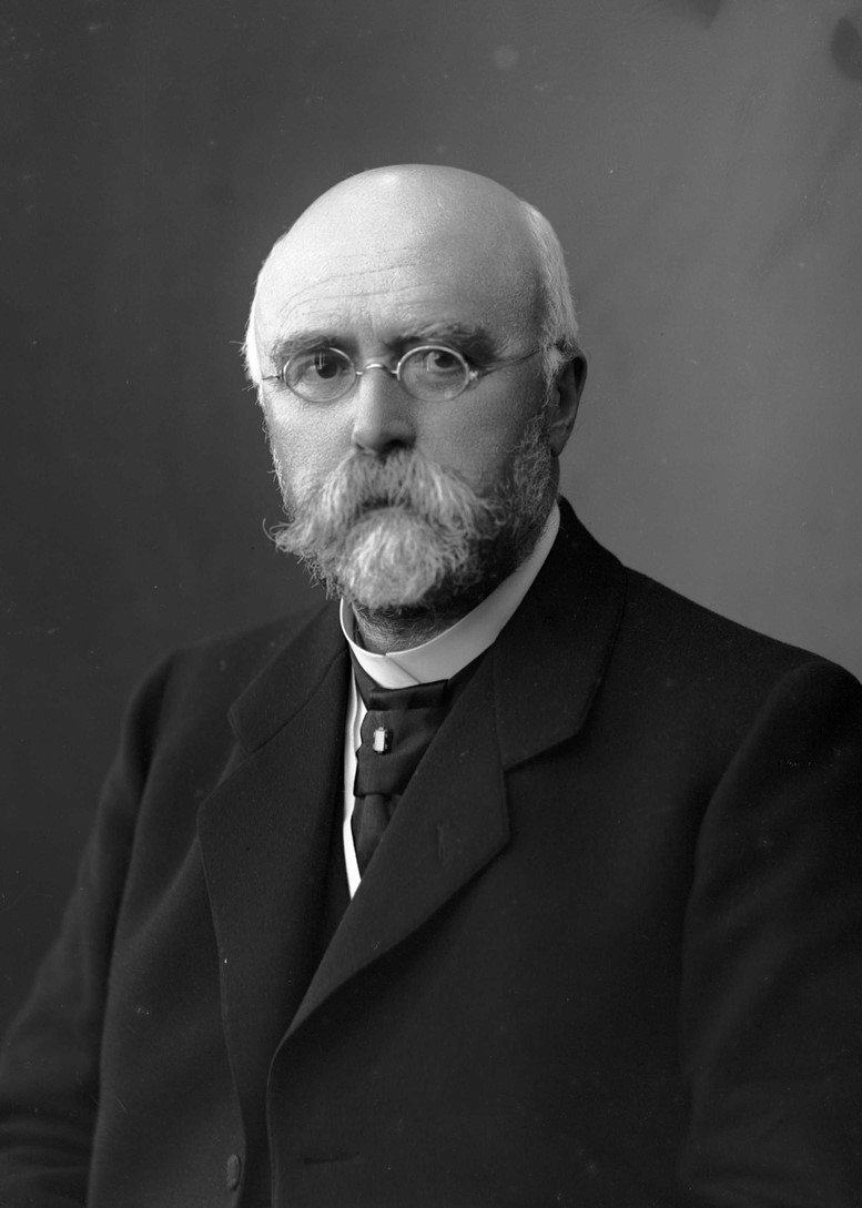 Bernhard Brænne (1854–1927), fabrikkeier i Trondhjem, stortingsmann og statsråd (H).